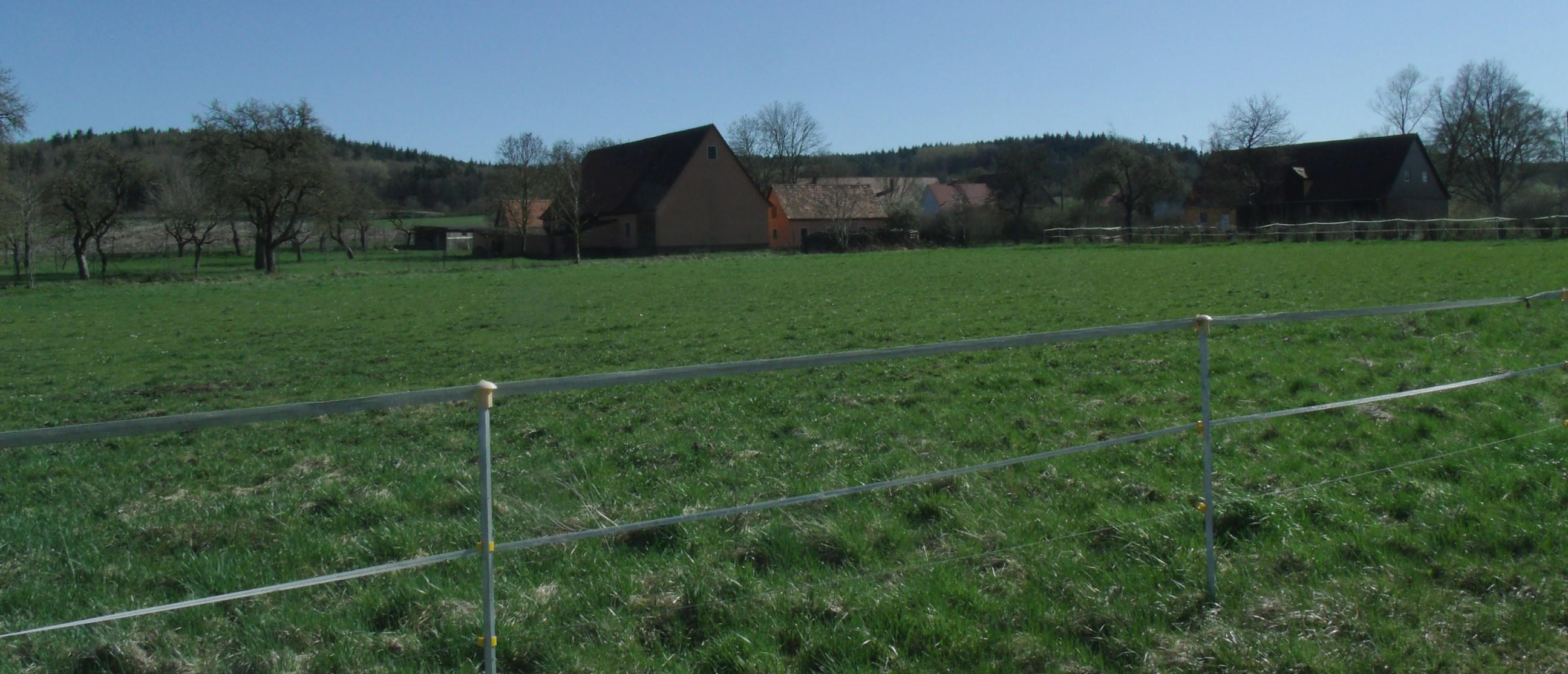 Atzenhofen, Ortsteil von Leutershausen im Landkreis Ansbach